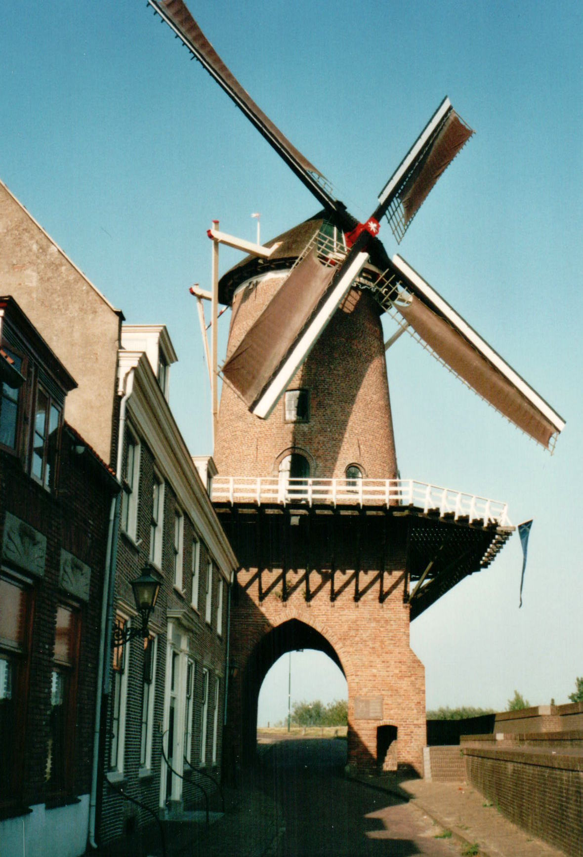 De Runmolenpoort in Wijk bij Duurstede: stadspoort en molen in één.